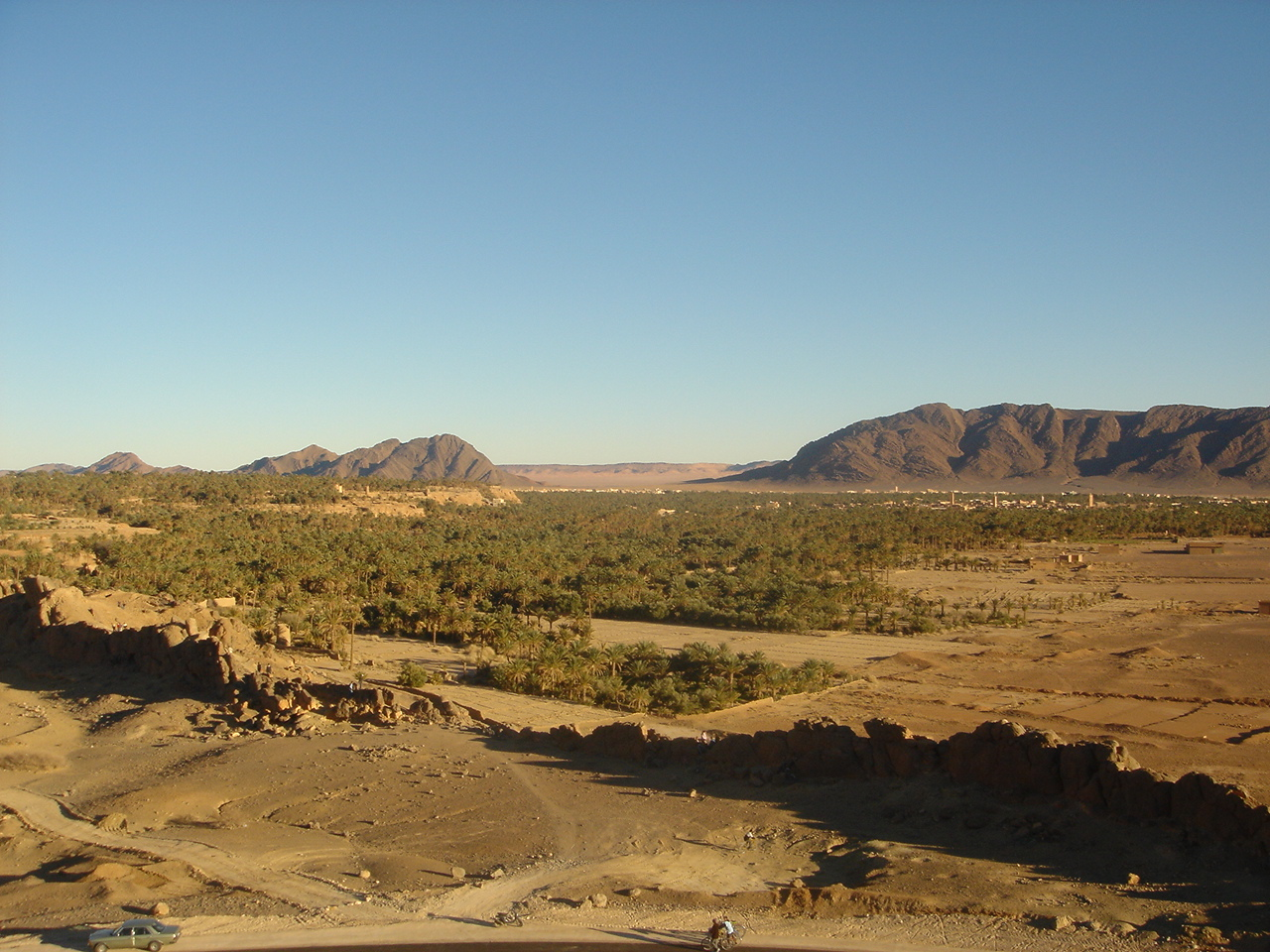 vue d'ensemble